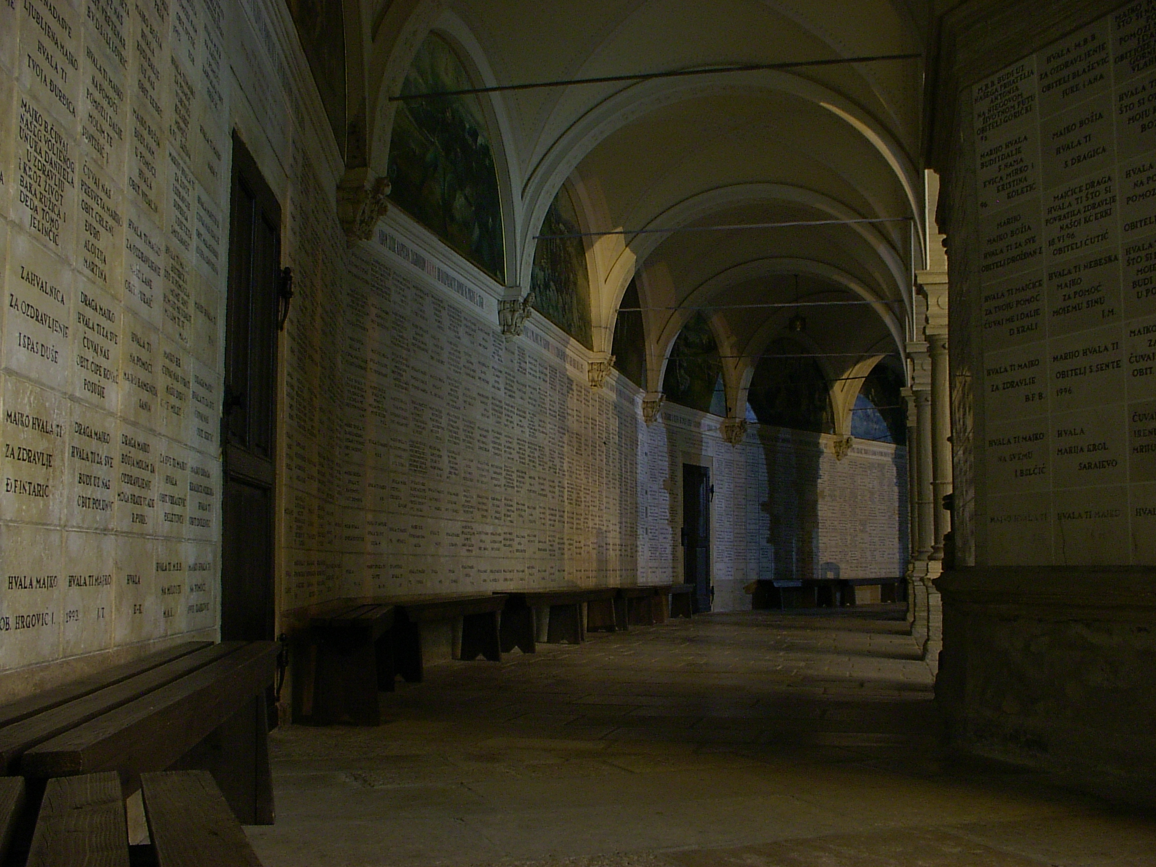 Arcades in Marija Bistrica.